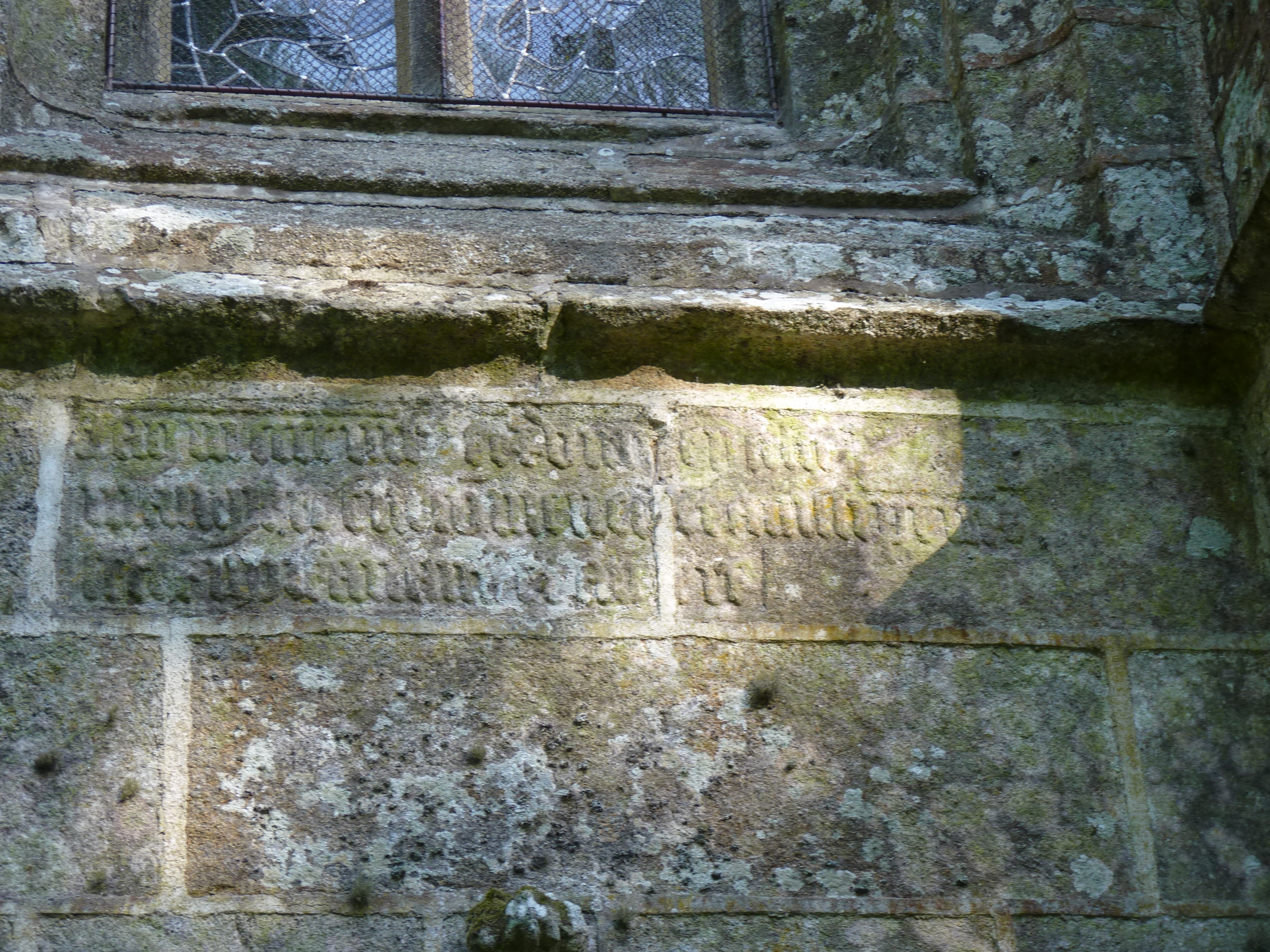 Détail d'une inscription en Breton sur la façade (voir notice des monuments historiques).